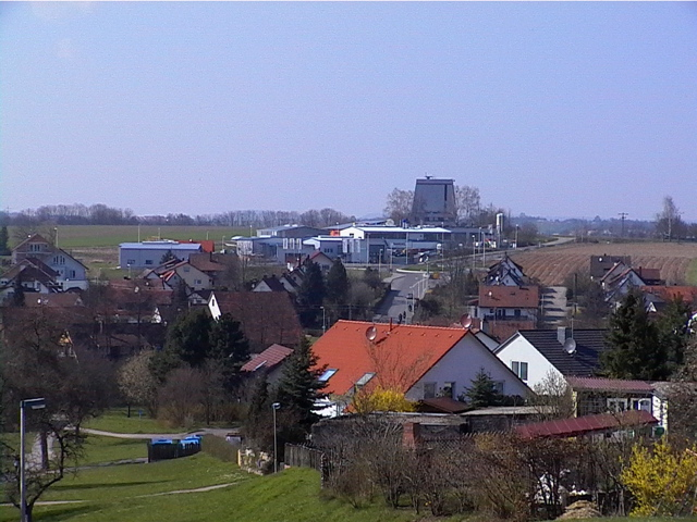 Blick über Allmersbach zum Antennenmeßplatz